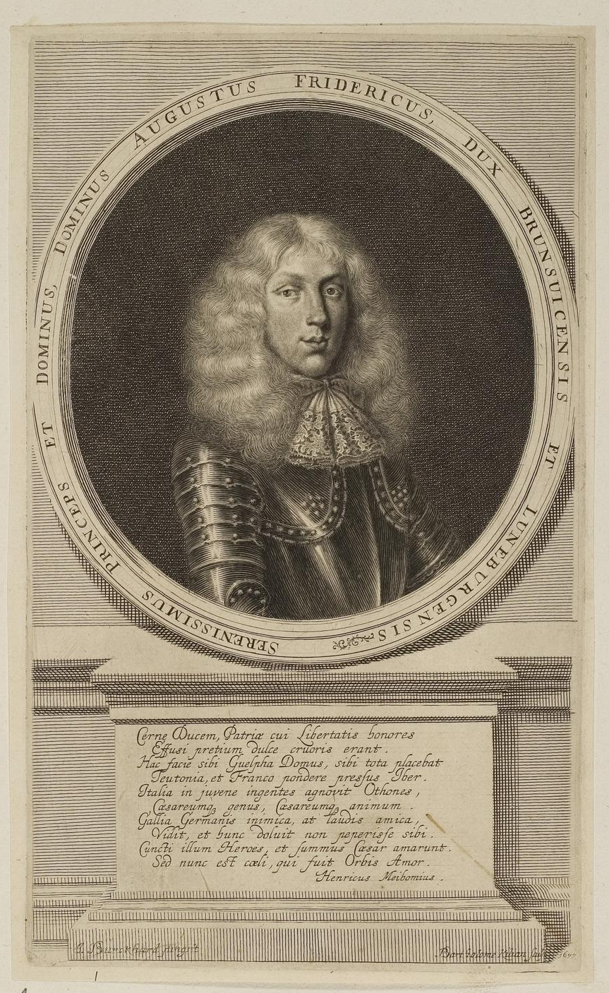 Grafik aus dem Klebeband Nr. 1 der Fürstlich Waldeckschen Hofbibliothek Arolsen Motiv: August Friedrich von Braunschweig-Wolfenbüttel (1657–1676), Sohn von Anton Ulrich von Braunschweig-Wolfenbüttel mit Gedicht von Henricus Meibomius (Heinrich Meibom)